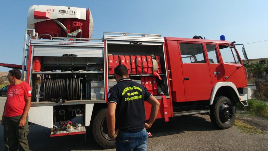 Ex autobotte dei pompieri austriaci, con sopra montata una turbina antincendio